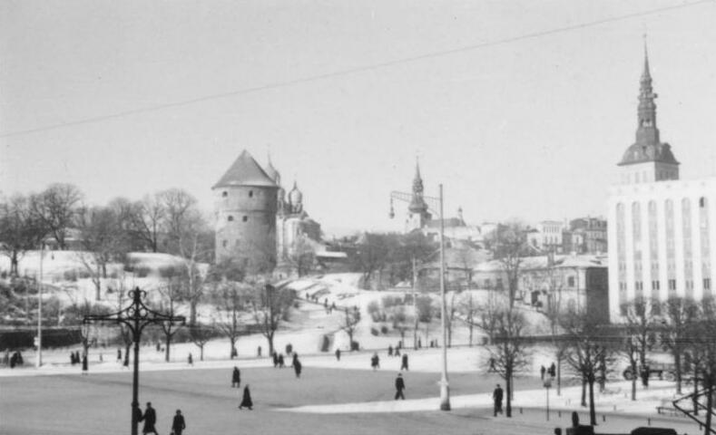 Reval [Tallin], Februar-März 1943 Blick vom Freiheitsplatz Einsatzstab Reichsleiter Rosenberg für die besetzten Gebiete - Hauptarbeitsgruppe Ostland Film: 46/11